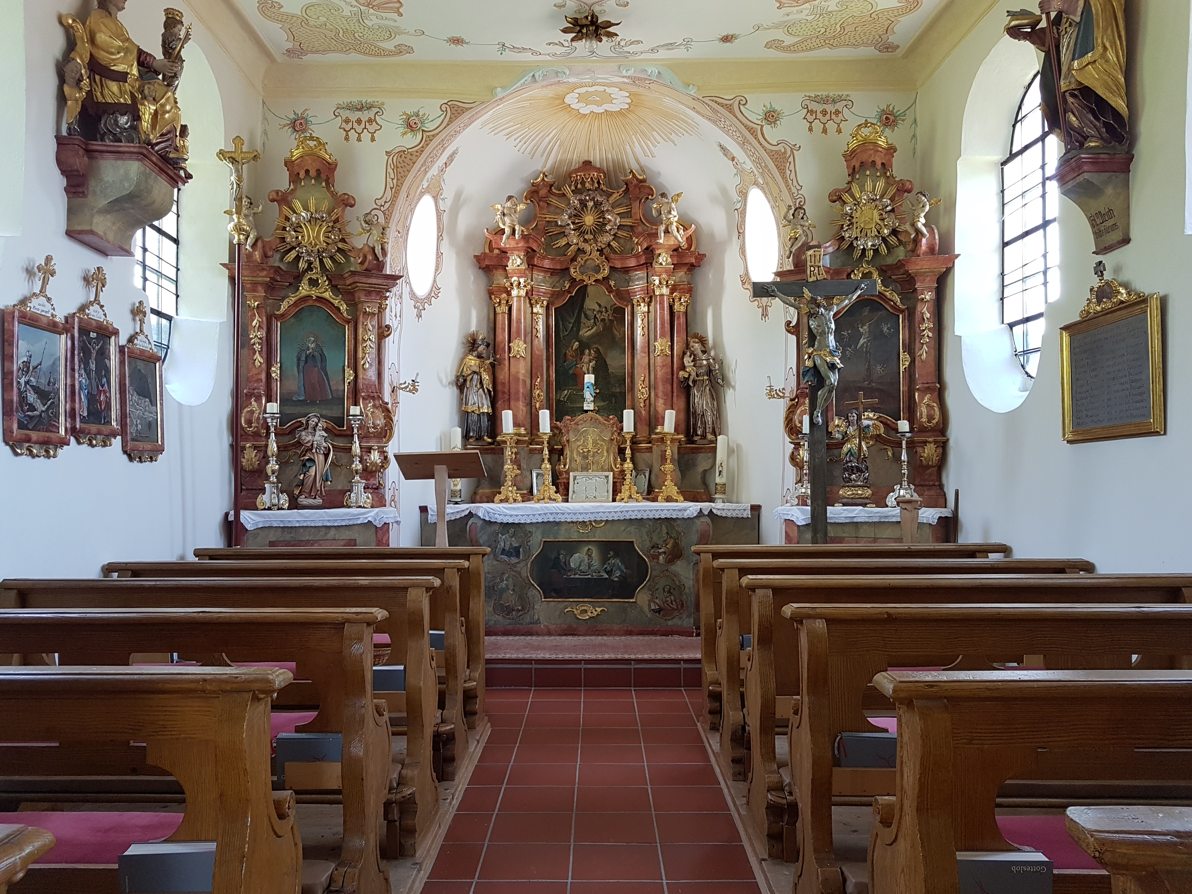 Kapelle